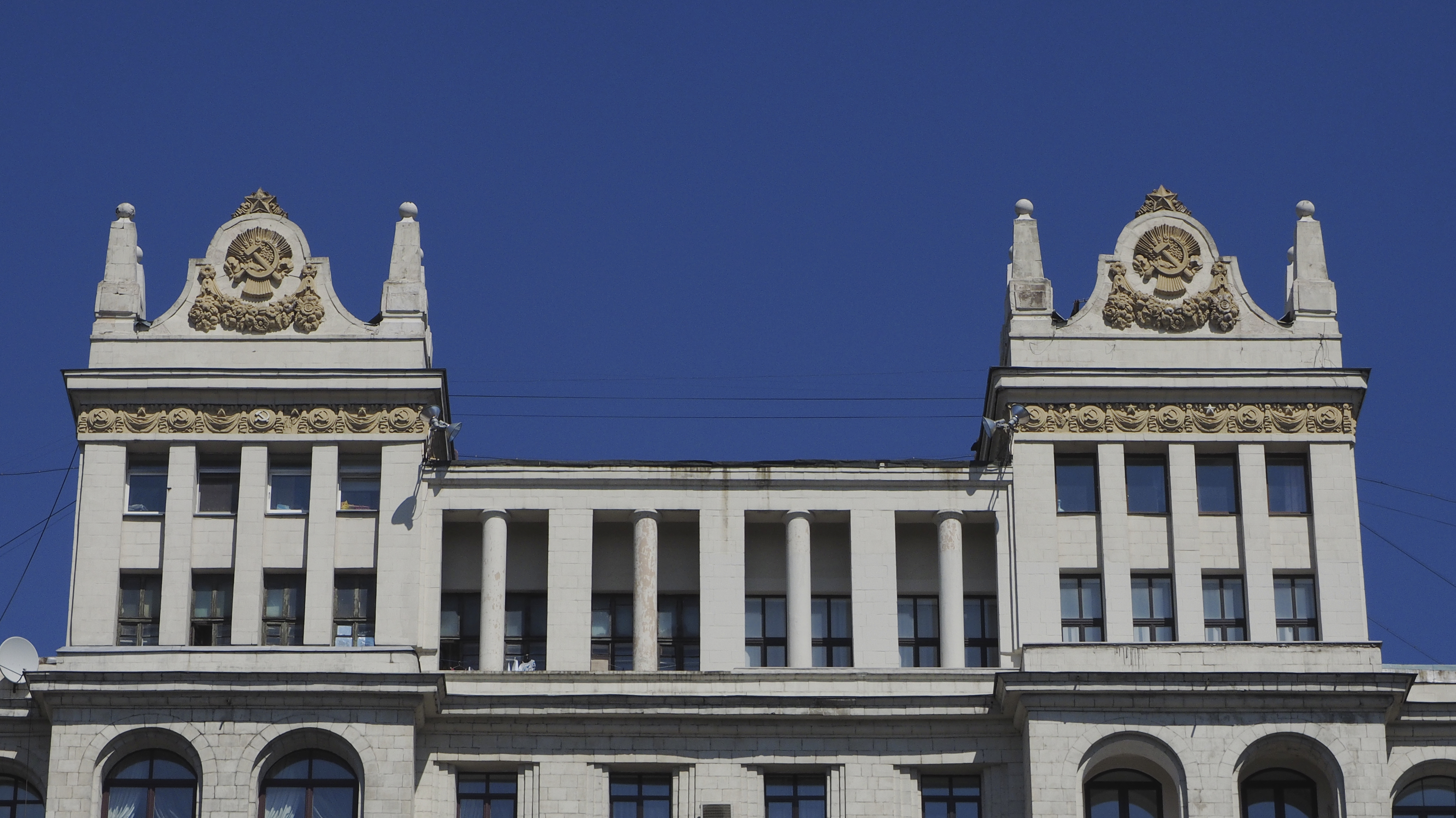 Skyscraper on Kotelnicheskaya naberezhnaya in Moscow. Detail of the riverside wing (1940, redesigned early 1950s)Здание на Котельнической набережной. Деталь речного фасада (постройка 1940 с послевоенными переделками)